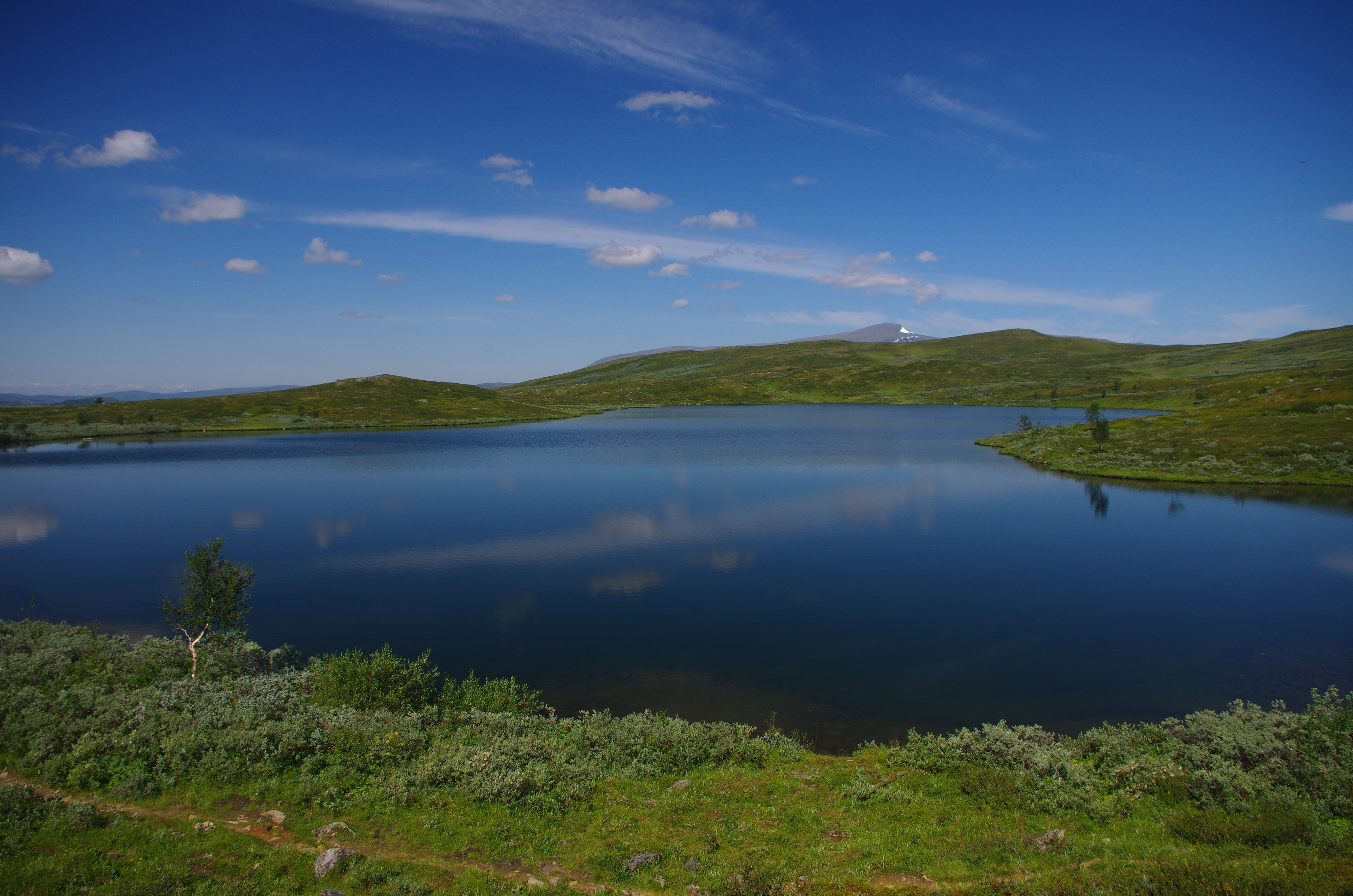 Seitäk eller Stájnna är en sjö i Sorsele kommun i Lappland i Sverige. Kungsleden passerar sjön.